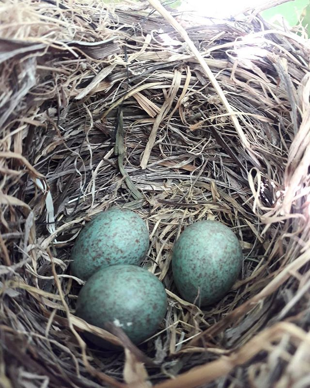 عُش يحتوي على بيض طائر الزرزور الأزرق